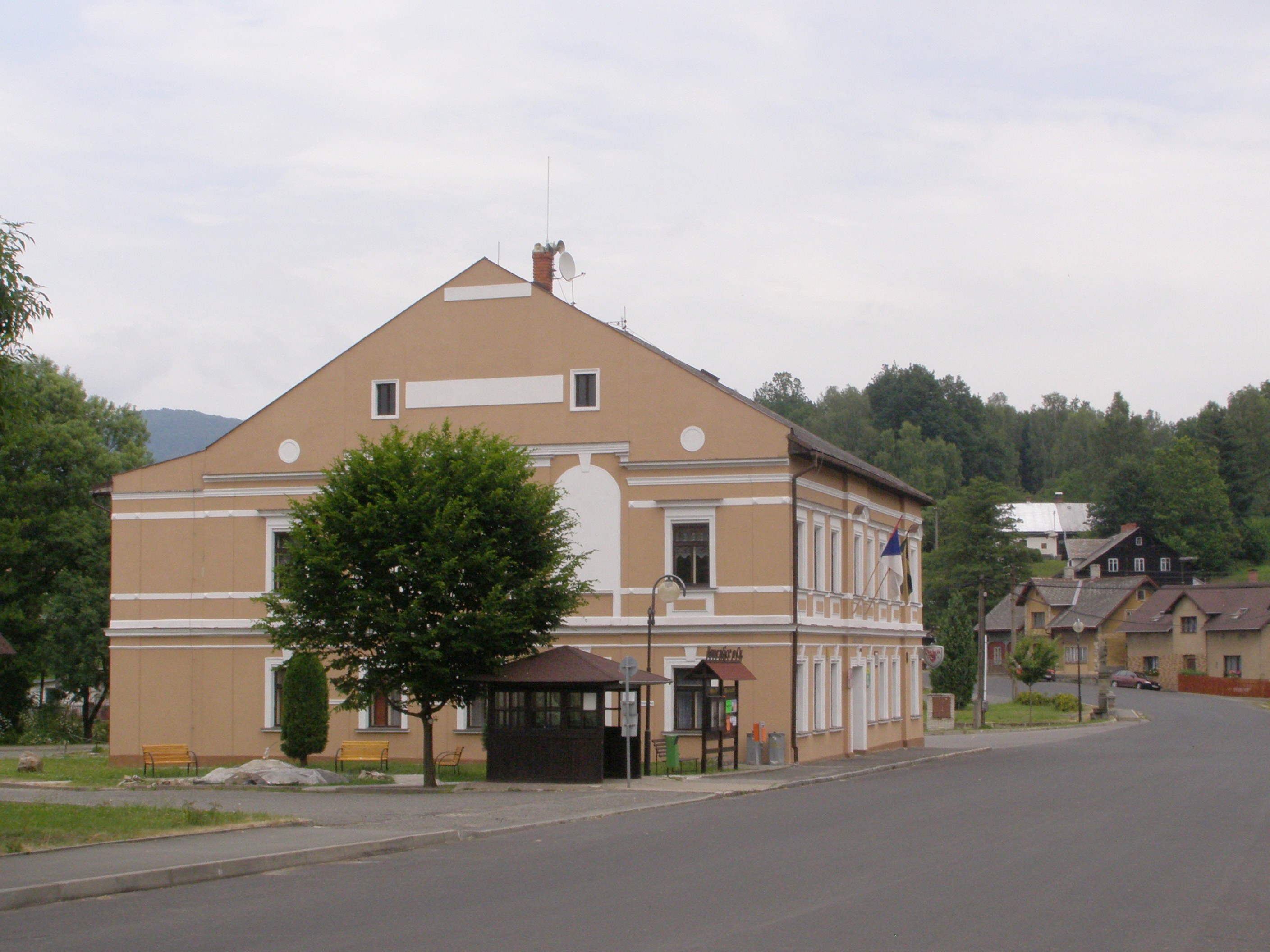 Česky: Kunratice u Cvikova, obecní úřad